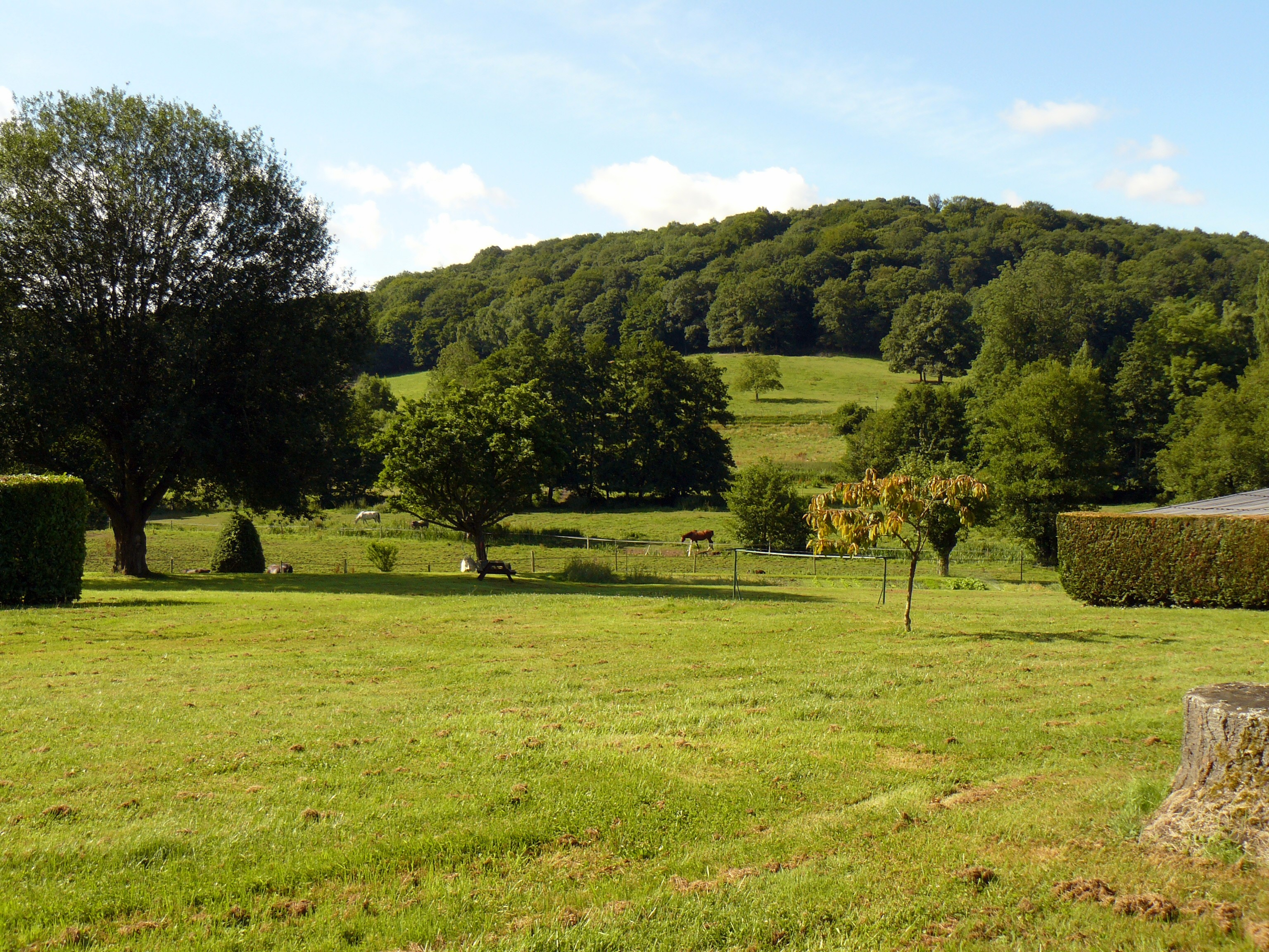 La vallée du Rhodon à Milon-la-Chapelle (Yvelines, France)